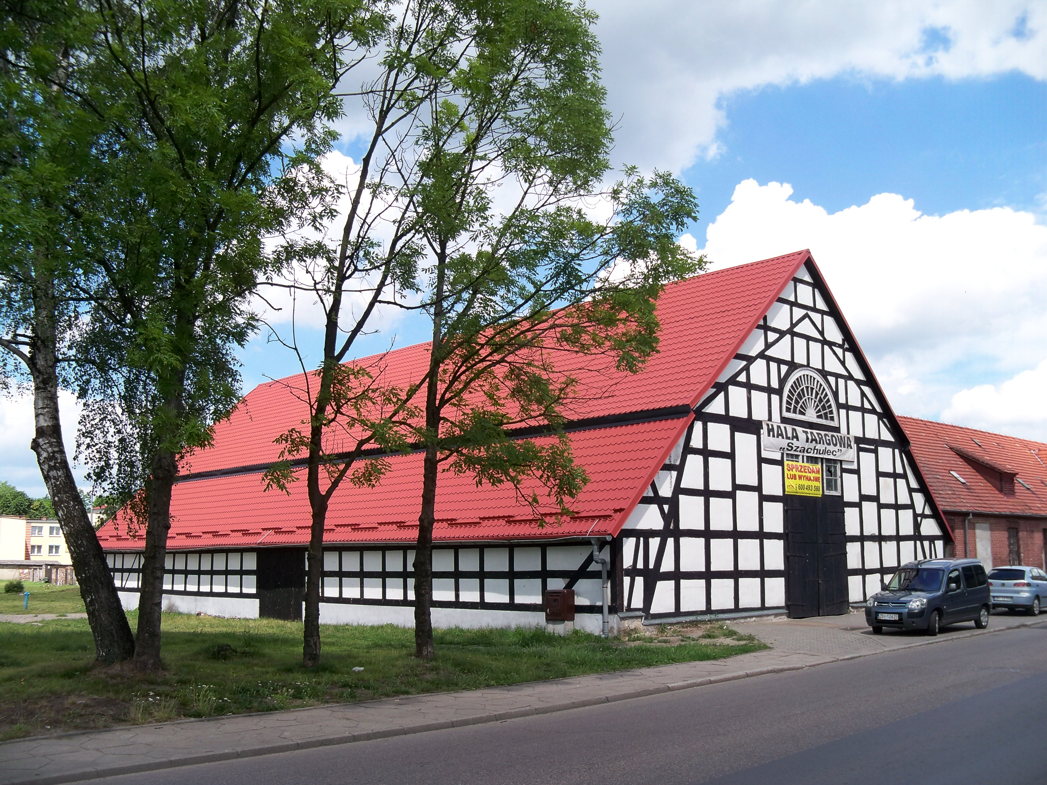 Białogard - dawny spichlerz przy ul. Piłsudskiego 25